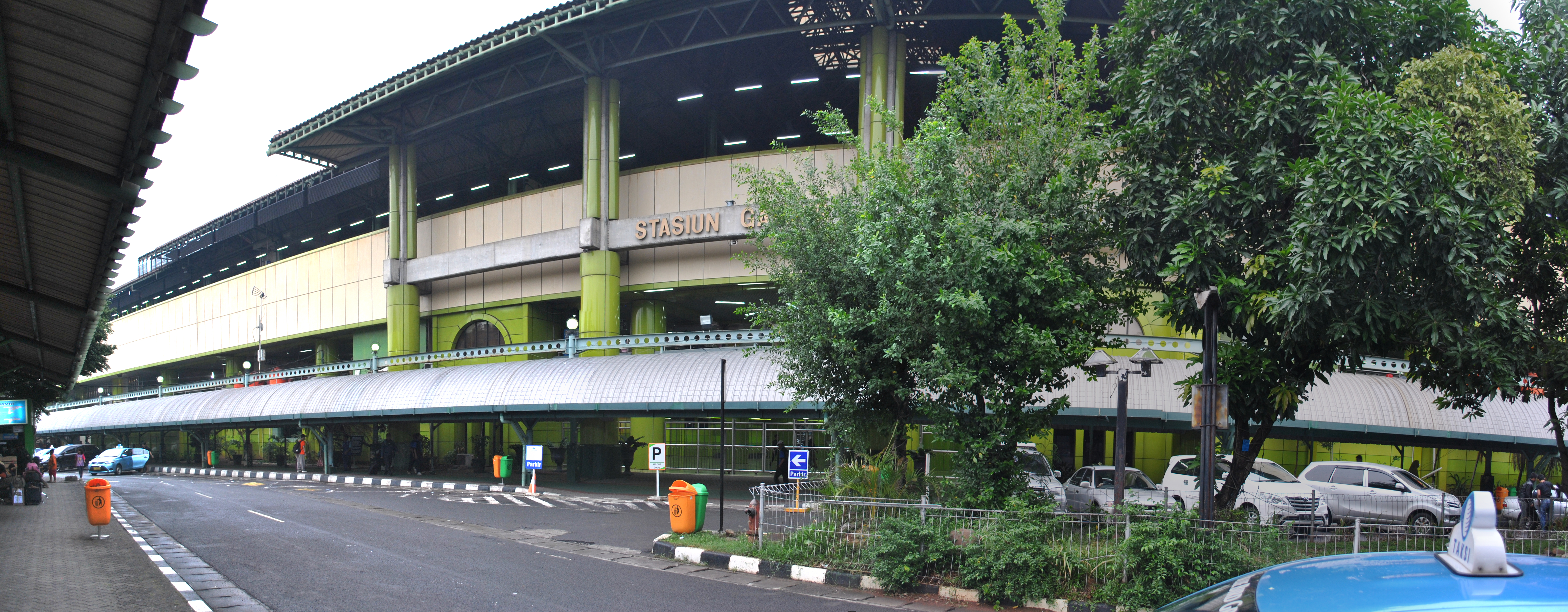 Stasiun Gambir